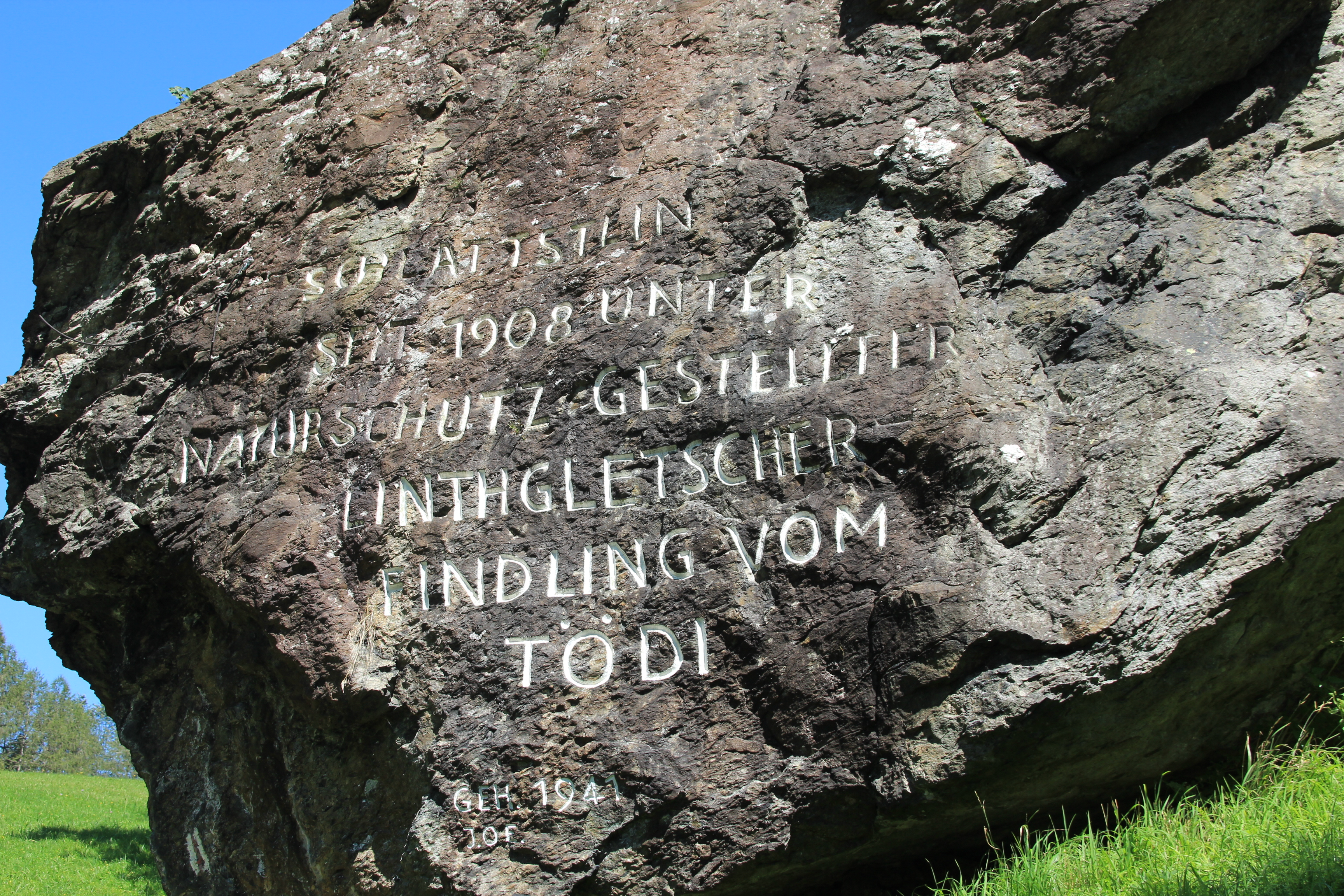 Schlattstein